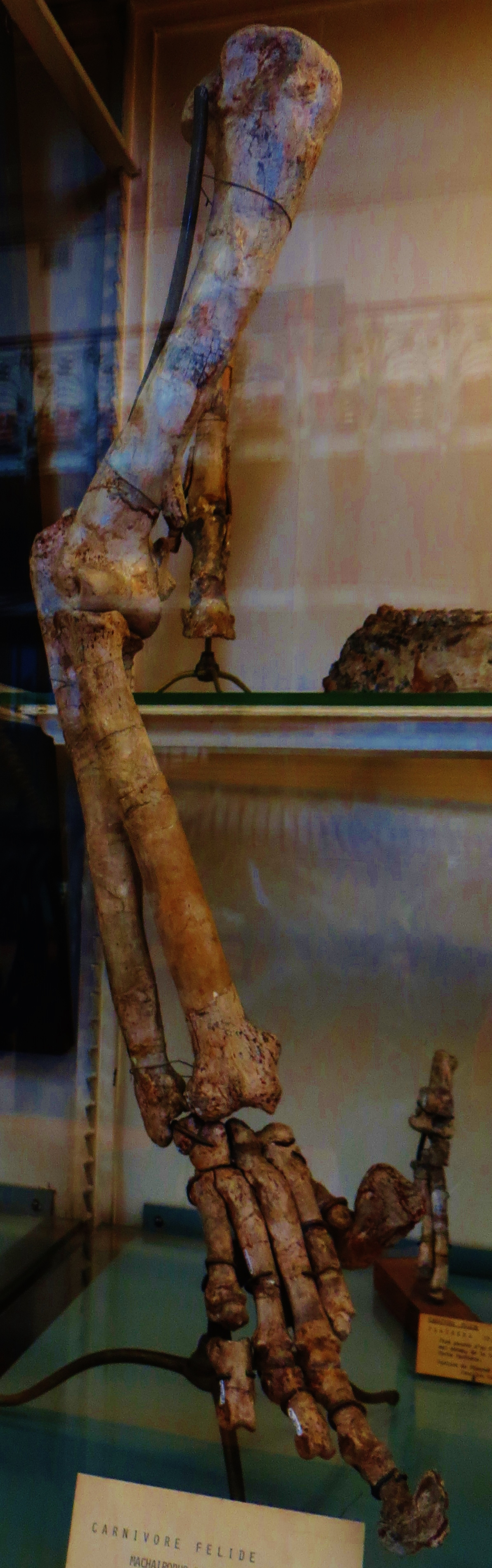 Fossil of Amphimachairodus, an extinct mammal- Took the photo at Musee d'Histoire Naturelle, Paris